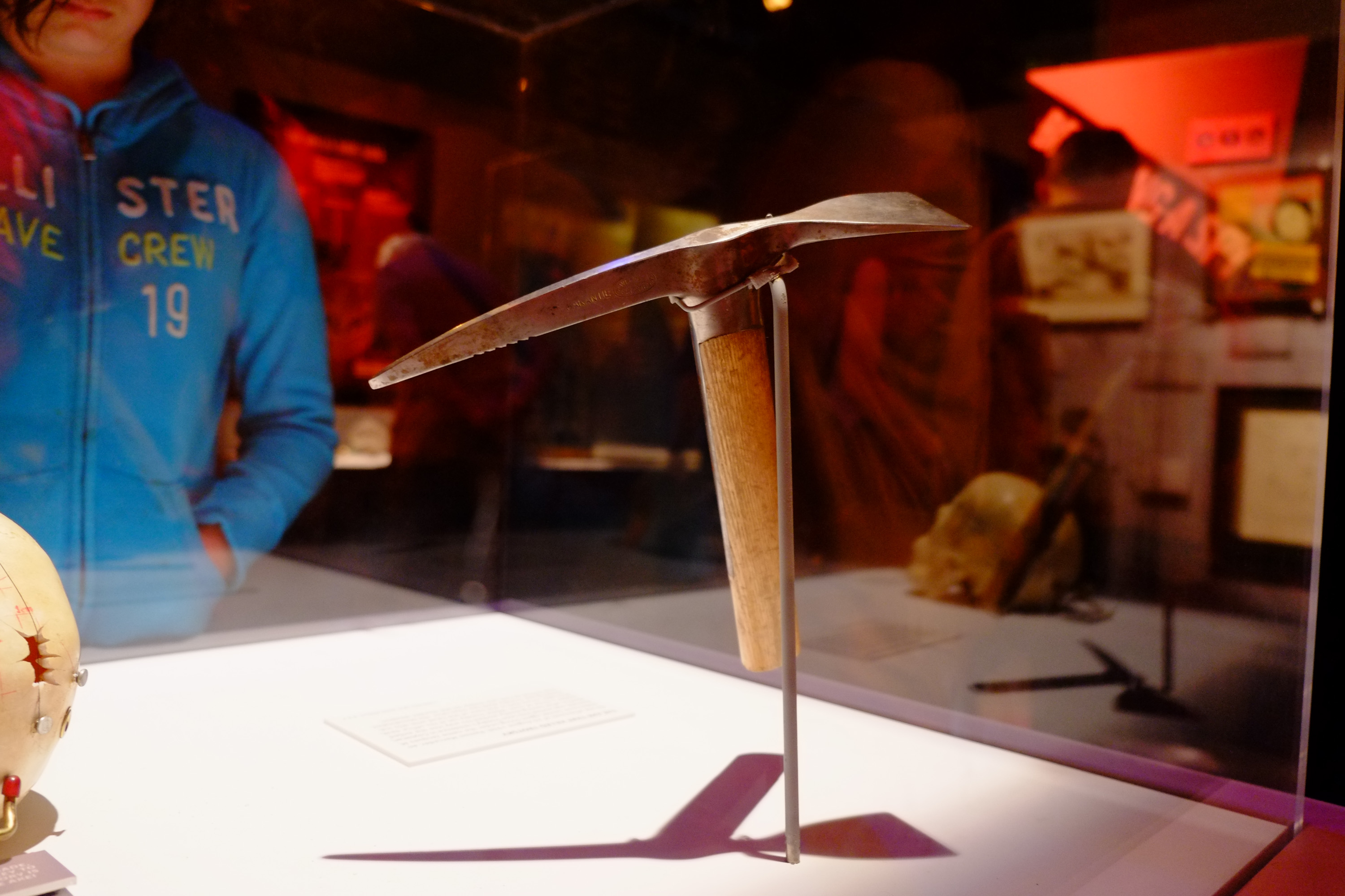 Piolet con el que Ramón Mercader asesinó a León Trotski. Tras reaparecer en manos de Ana Alicia Salas Salas (hija de Alfredo Salas Espejel, agente y comandante del antiguo Servicio Secreto mexicano y cofundador del Museo de Criminología), fue adquirido por el coleccionista estadounidense H. Keith Melton. Aquí aparece en la exposición 'Spy: The Secret World of Espionage' en el Franklyn Institute de Filadelfia